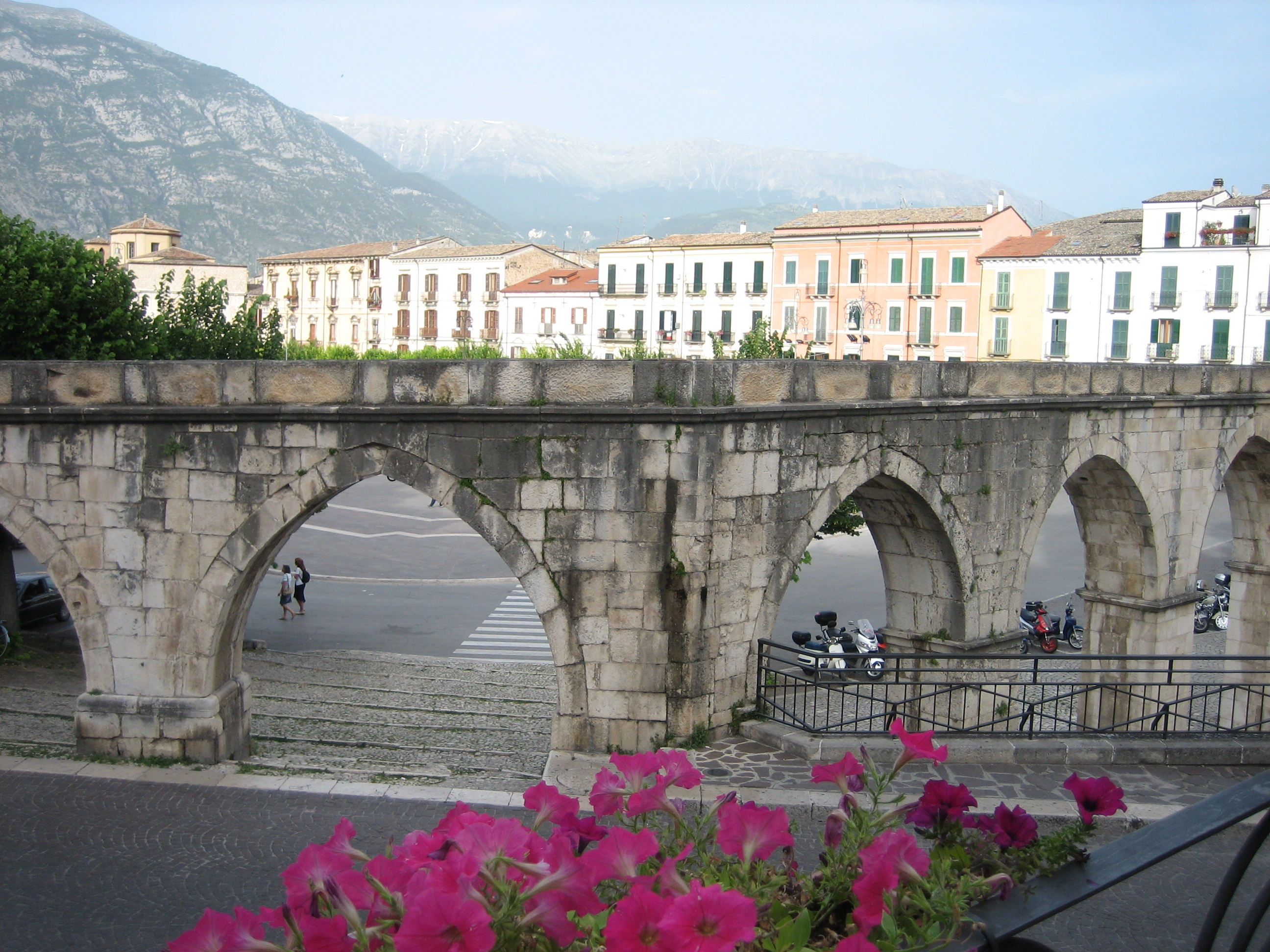 Veduta di piazza Garibaldi a Sulmona